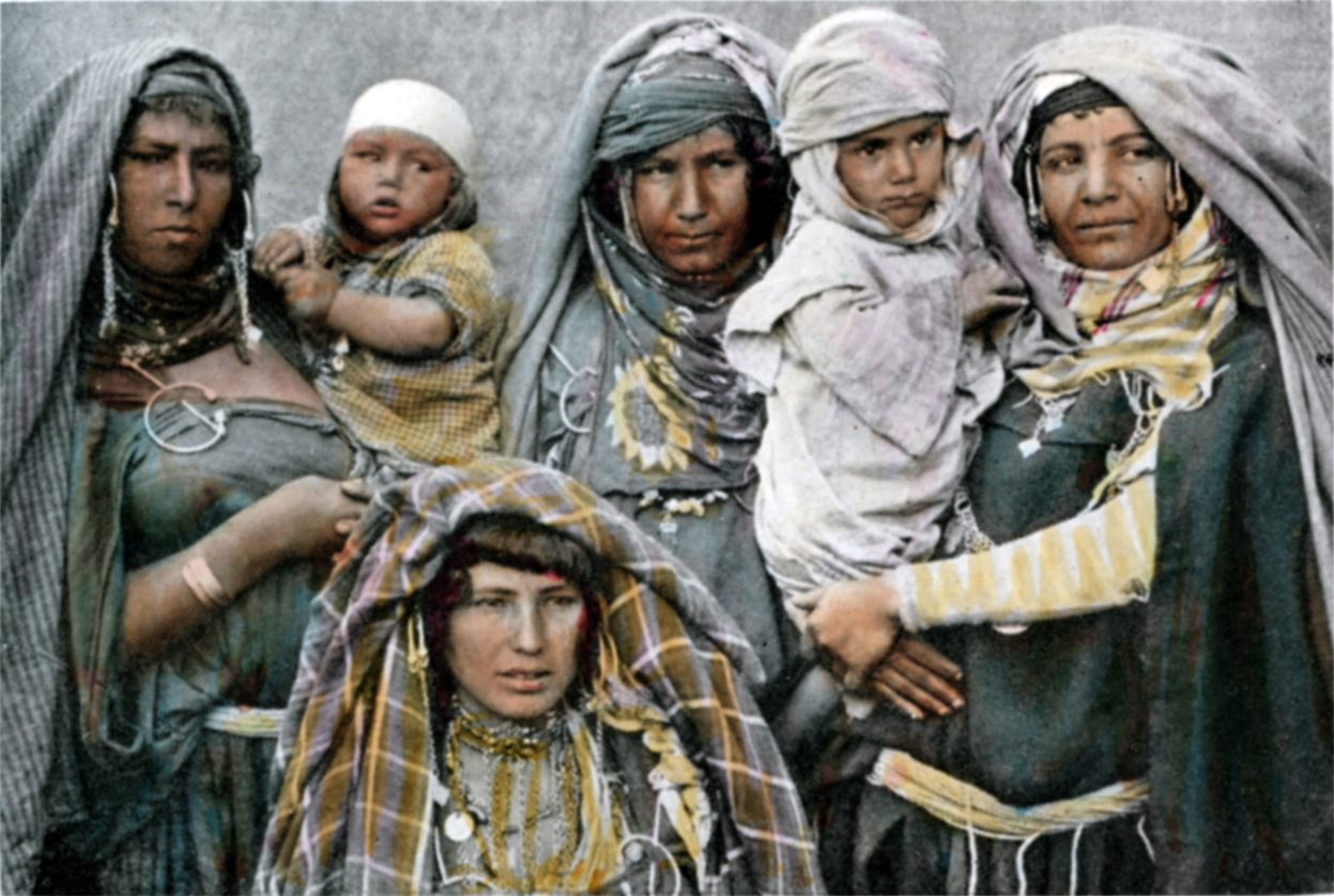 Gruppe von Beduininnen in Tunis.